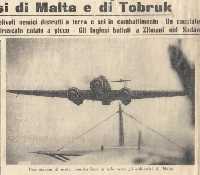 Da un giornale del 28 febbraio 1941, di cui ne possiedo una copia originale. Il titolo completo è: Attacchi in forza degli aerei dell'Asse sulle basi di Malta e Tobruk. La fotografia ritrae gli SM79 in volo verso Malta.